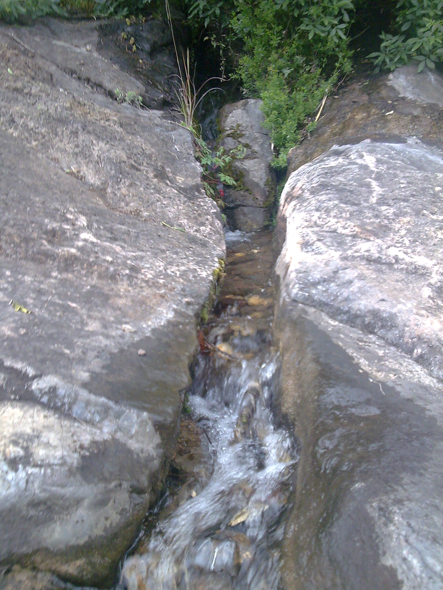 Font de la Pixera, Tales (Plana Baixa)